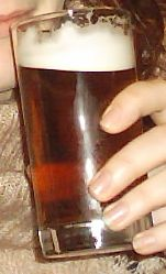 Pale Ale